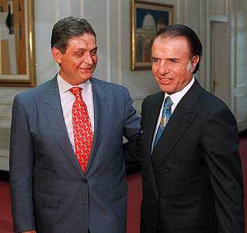 El presidente Menem recibió al ex presidente de la República de Bolivia, Jaime Paz Zamora y a su señora esposa, Viviana Limpias.